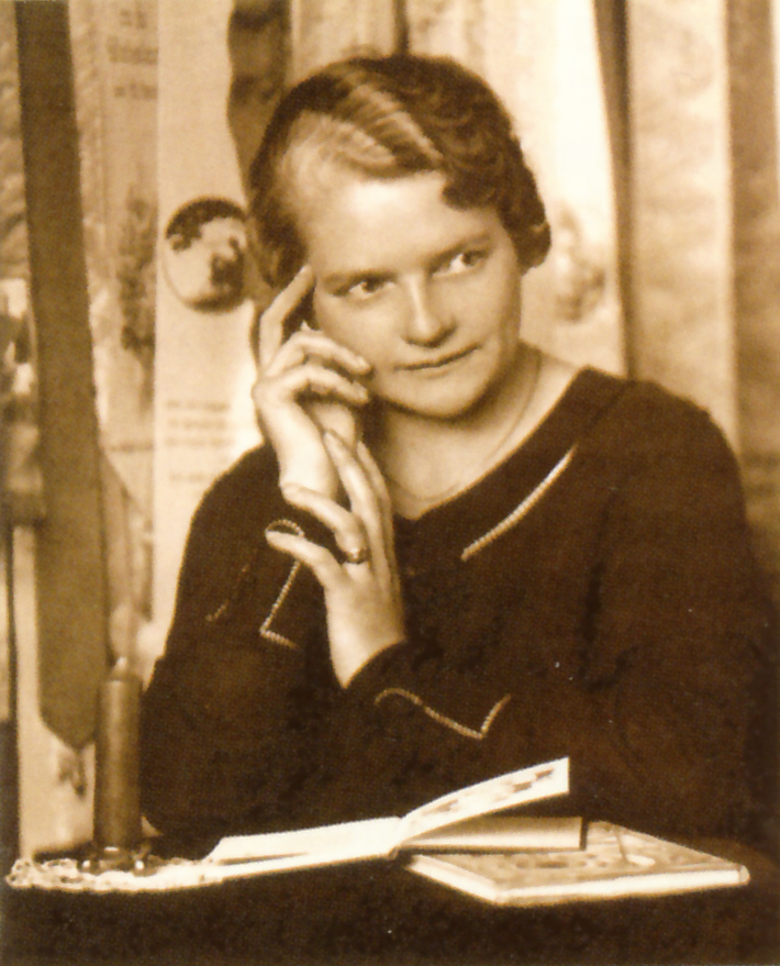 Margarete Seemann (1893-1949), österreichische Kinder- und Jugendschriftstellerin (Bild: Bezirksmuseum Meidling)